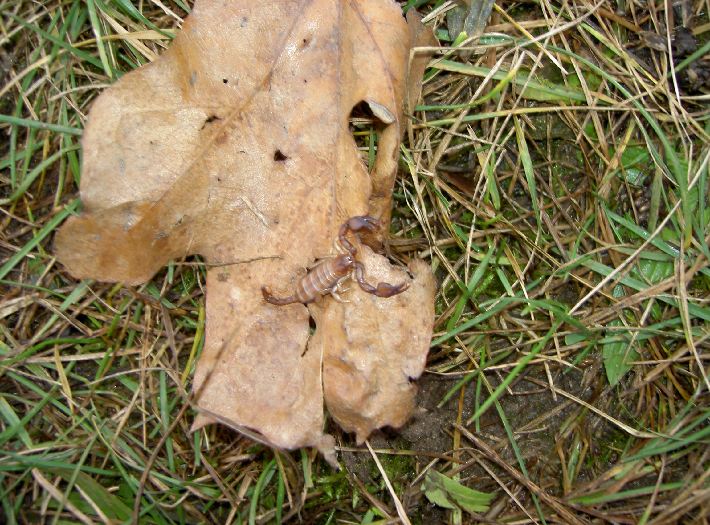 Euscorpius tergestinus Česká republika